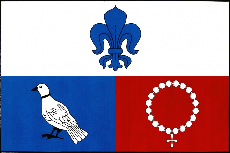 vlajka, Podolí , okres Žďár nad Sázavou